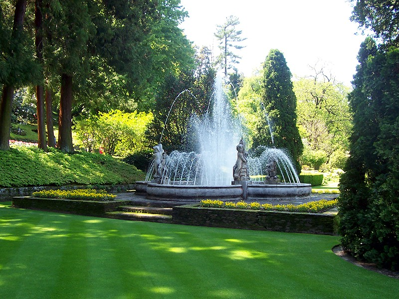 Verbania - Fontana dei Putti a Villa Taranto